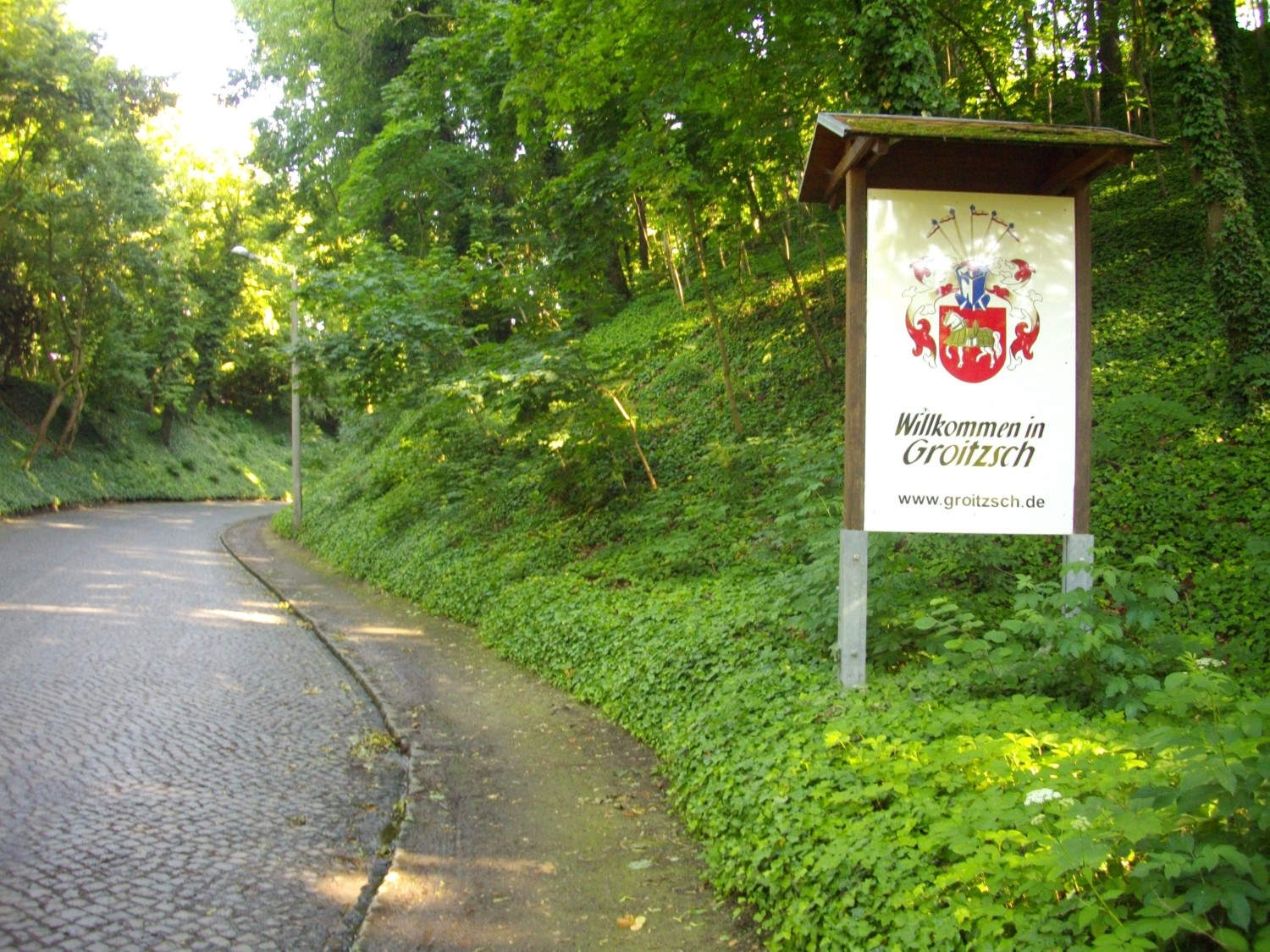 Ortseingang nach Groitzsch unterhalb der Wiprechtsburg, Landkreis Leipzig